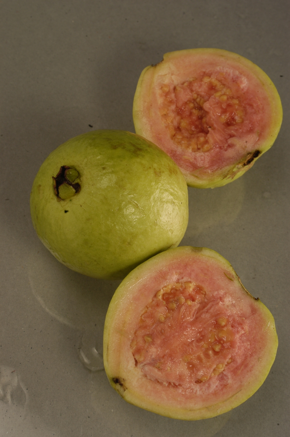 Psidium guajava (local:Jambu batu).